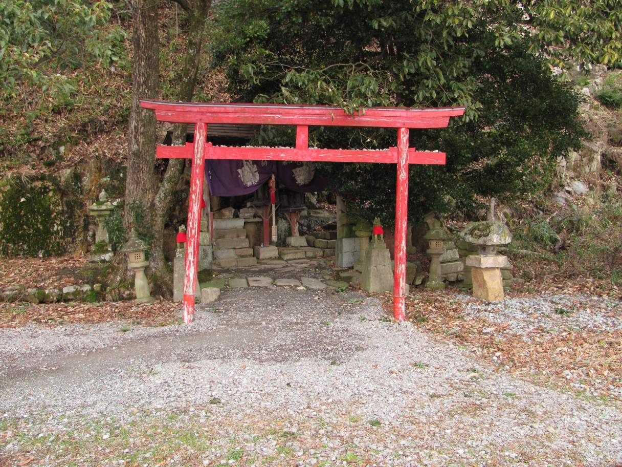 鳥取市久松山の二ノ丸にある桂蔵坊を奉る中坂神社。